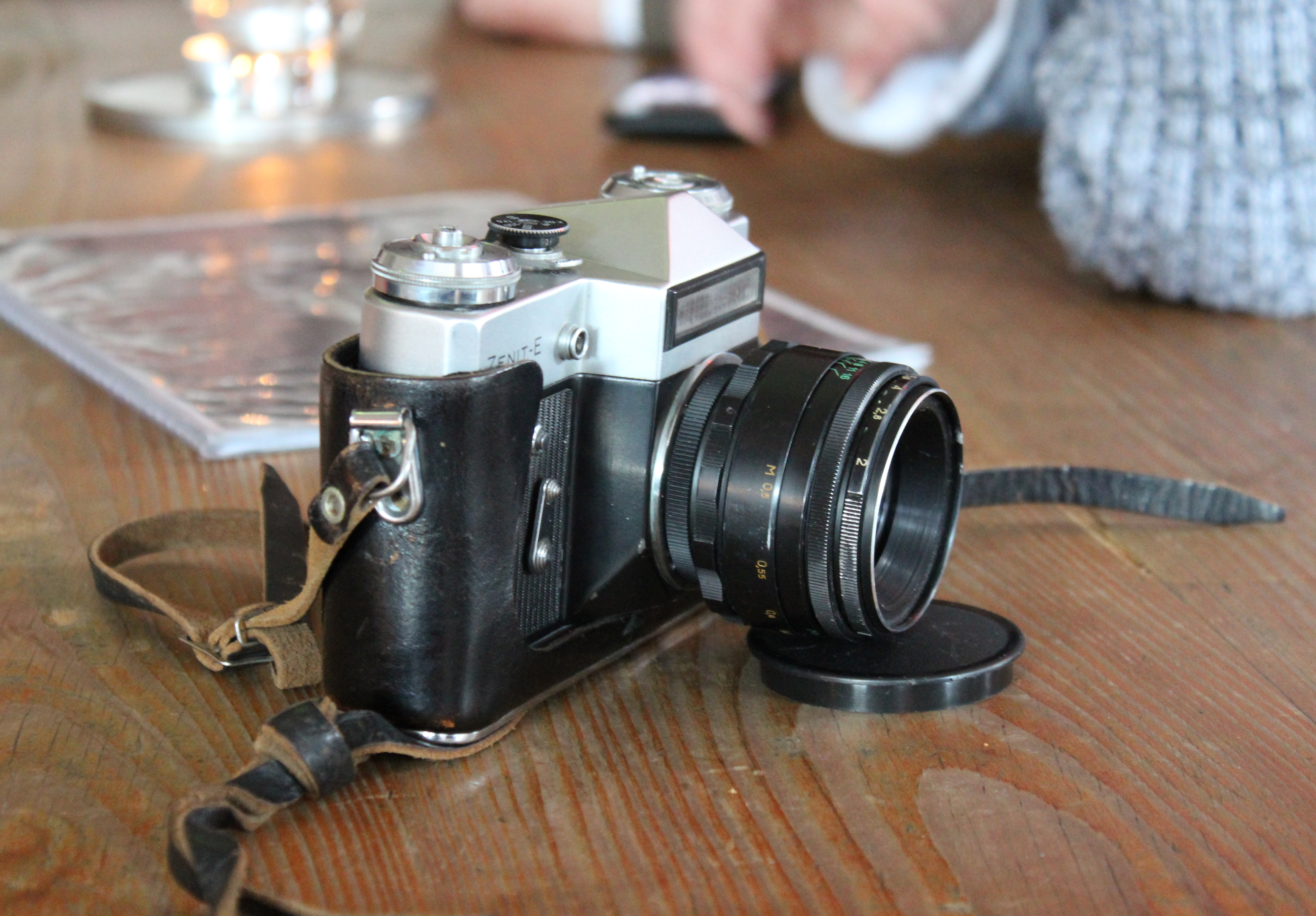 (M)eine Zenit E beim Photowalker-Treffen im Künstlerhaus Kempten